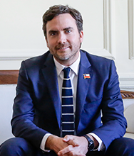 Fotografía del Subsecretario de Hacienda Francisco Moreno Guzmán